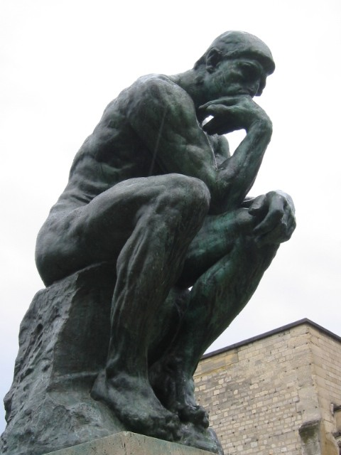 Penseur de Rodin - Musée Rodin - Hotel Biron - Paris